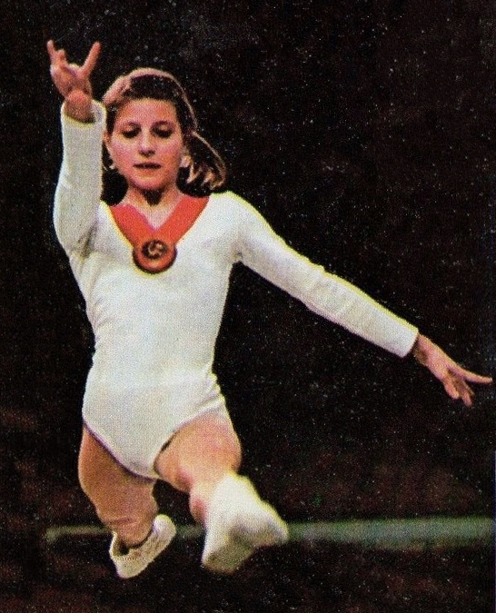 CAMPIONI dello SPORT 1973/74-Figurina n.176- KORBUT - GINNASTICA -Rec